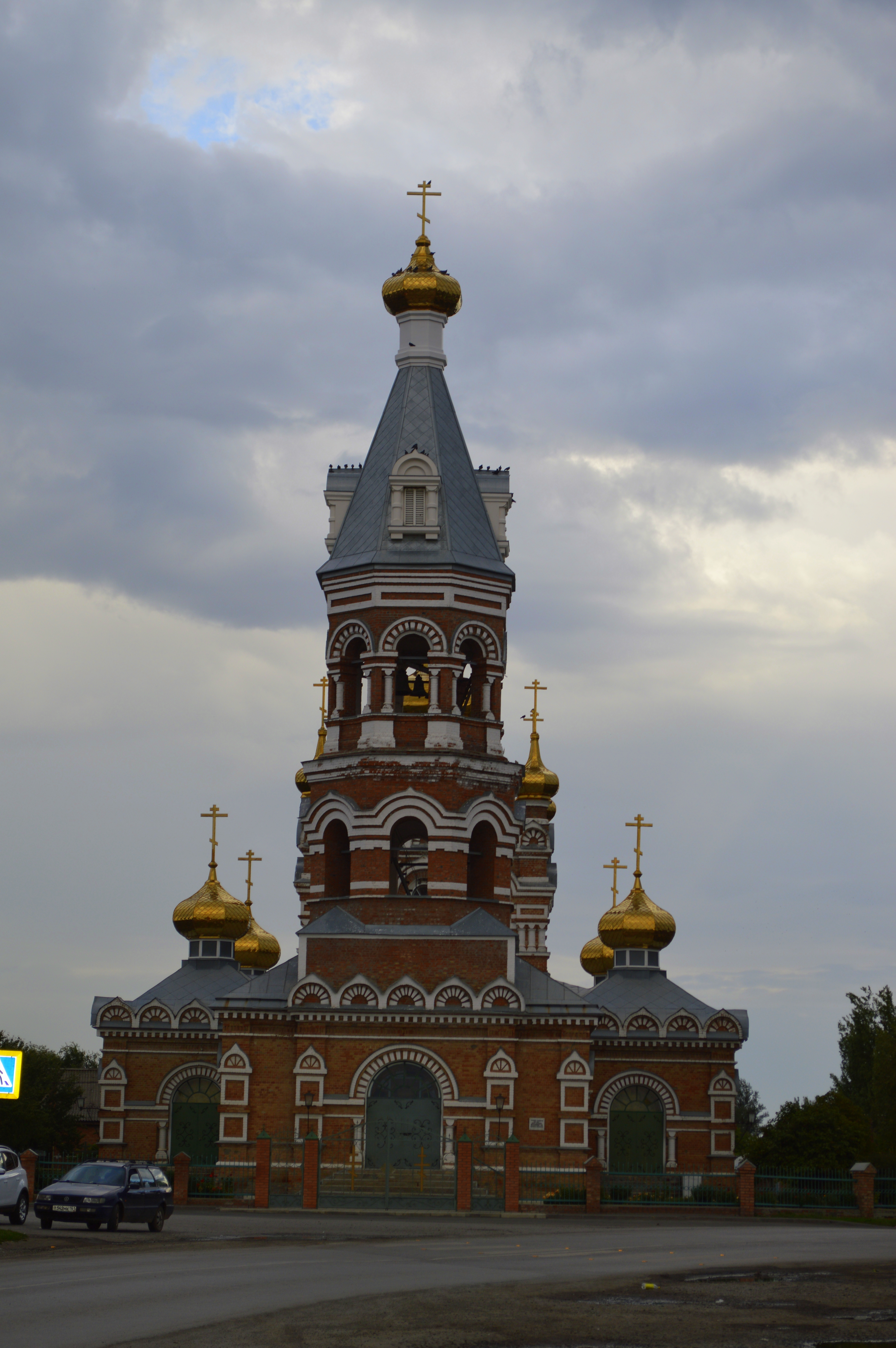 Свято—троицкая церковь (Ростовская область, Мартыновский район, слобода Большая Мартыновка, в начале улица Ленина)